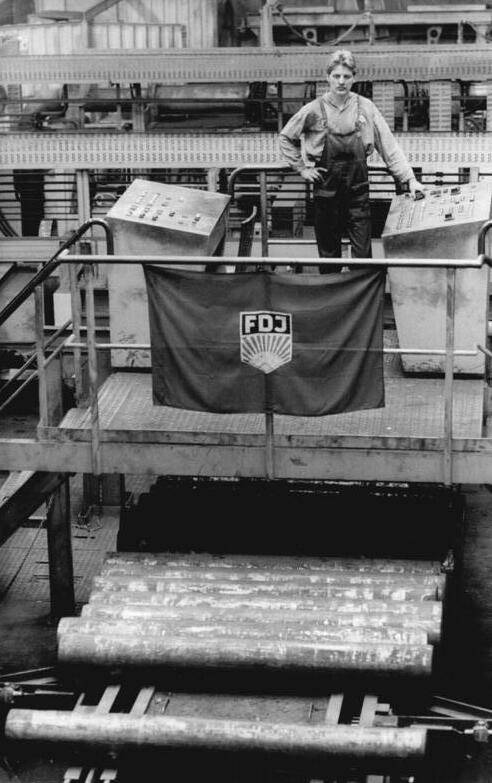 Berlin, VEB Elektrokohle Lichtenberg, Elektroköhler ADN-ZB Zimmermann 2.4.84 Berlin: Junge Elektroköhler-Aufmerksamer Anlagenfahrer an der teilautomatisierten Graphit-Elektrodenlinie im VEB Elektrokohle Lichtenberg, die die Jugendbrigade "Deutsch-bulgarische Freundschaft" der Elektrodendreherei im vergangenen Jahr als Jugendobjekt übernommen hat, ist Michael Neumann - hier am Steuerpult. Auf der hochproduktiven Anlage werden dreischichtig Graphit-Elektroden für die Stahlproduktion gedreht und gefräst. Das Sortiment reicht von 15 Kilogramm schweren Elektroden bis zu solchen mit über 300 Kilogramm Masse. Das Jugendkollektiv, es wurde 1983 mit dem Titel "Hervorragende Jugendbrigade der DDR" ausgezeichnet, kämpft um eine hohe Auslastung der Anlage und um kurze Umrüstzeiten. Die Fertigung an der Linie erbringt eine um rund 6 Prozent höhere Arbeitsproduktivität und erleichtert den Elektroköhlern ihre bisher körperlich schwere Arbeit wesentlich. - siehe auch 1984-0402-18, 20, 21, 22N